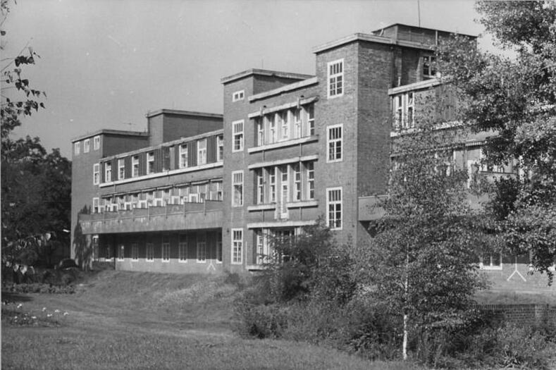 Magdeburg, Medizinische Akademie, Chirurgische Klinik Zentralbild Ritter 9.9.1964 Zum zehnjährigen Bestehen der Medizinische Akademie Magdeburg Das Gebäude der Chirurgischen Klinik. Es enthält 270 Betten, 3 Operationssäle, einen Röntgentrakt und einen Lebertrakt.